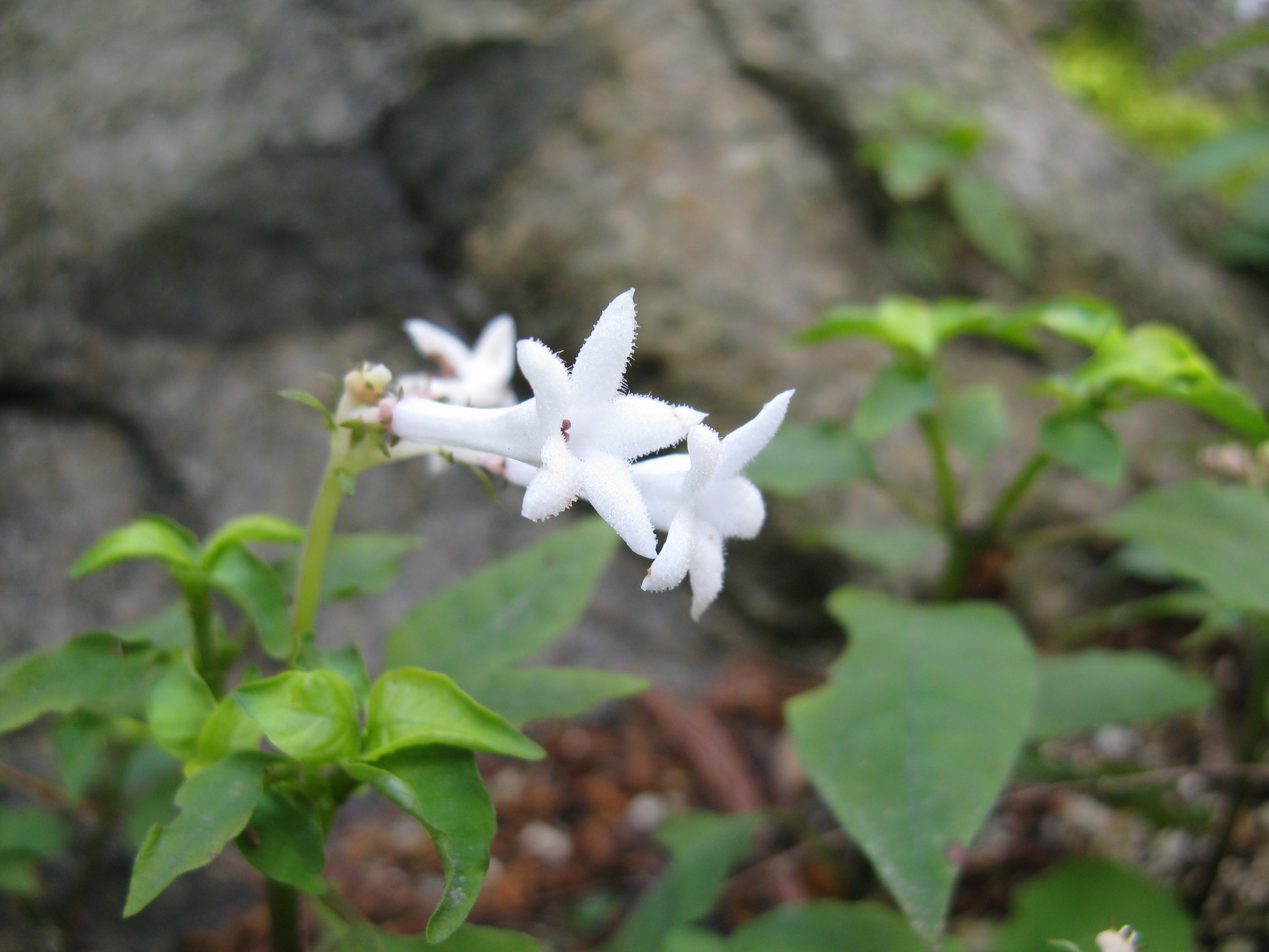 Scientific name Ophiorrhiza_japonica